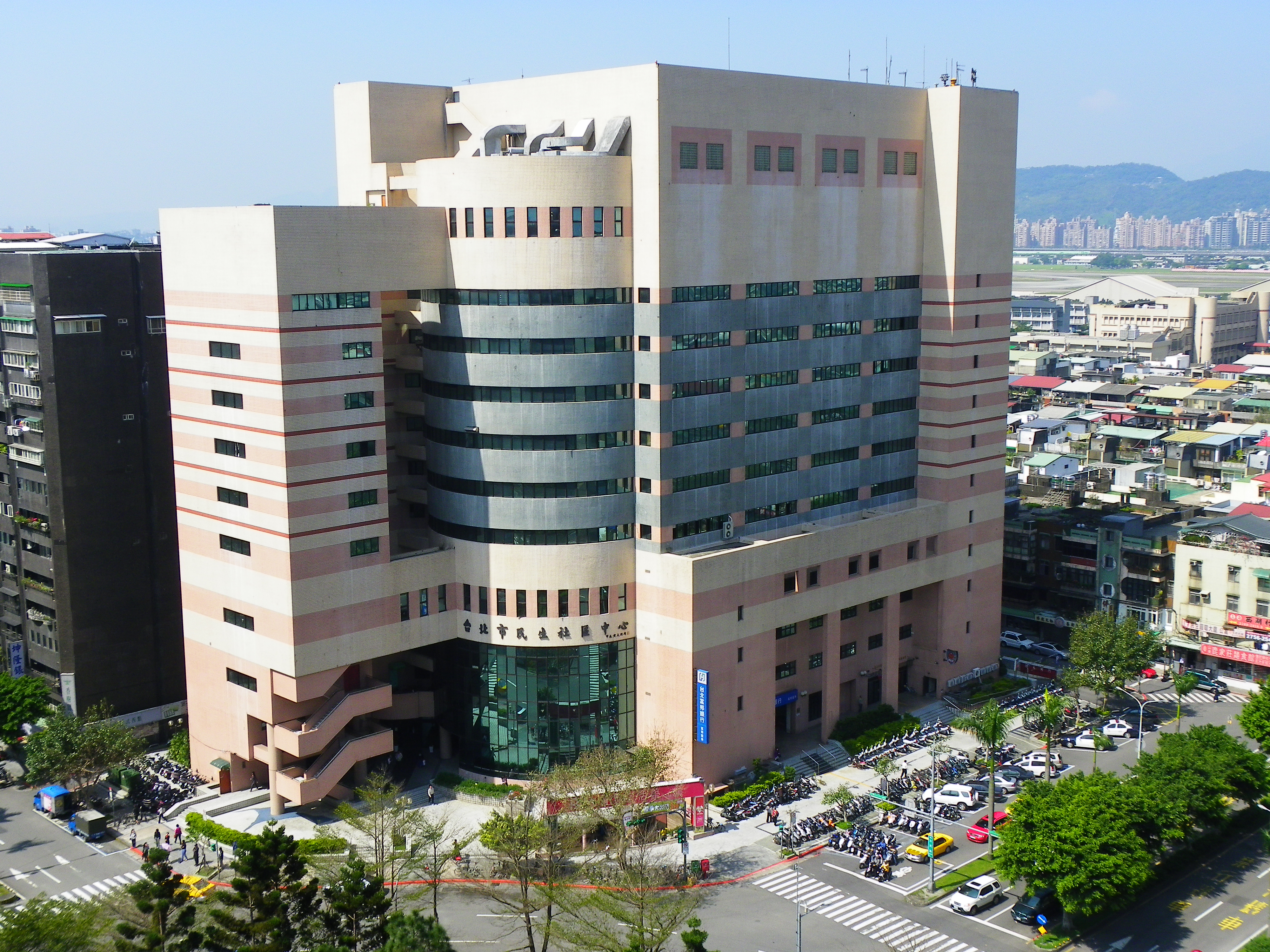 從高處俯瞰臺北市民生社區活動中心。